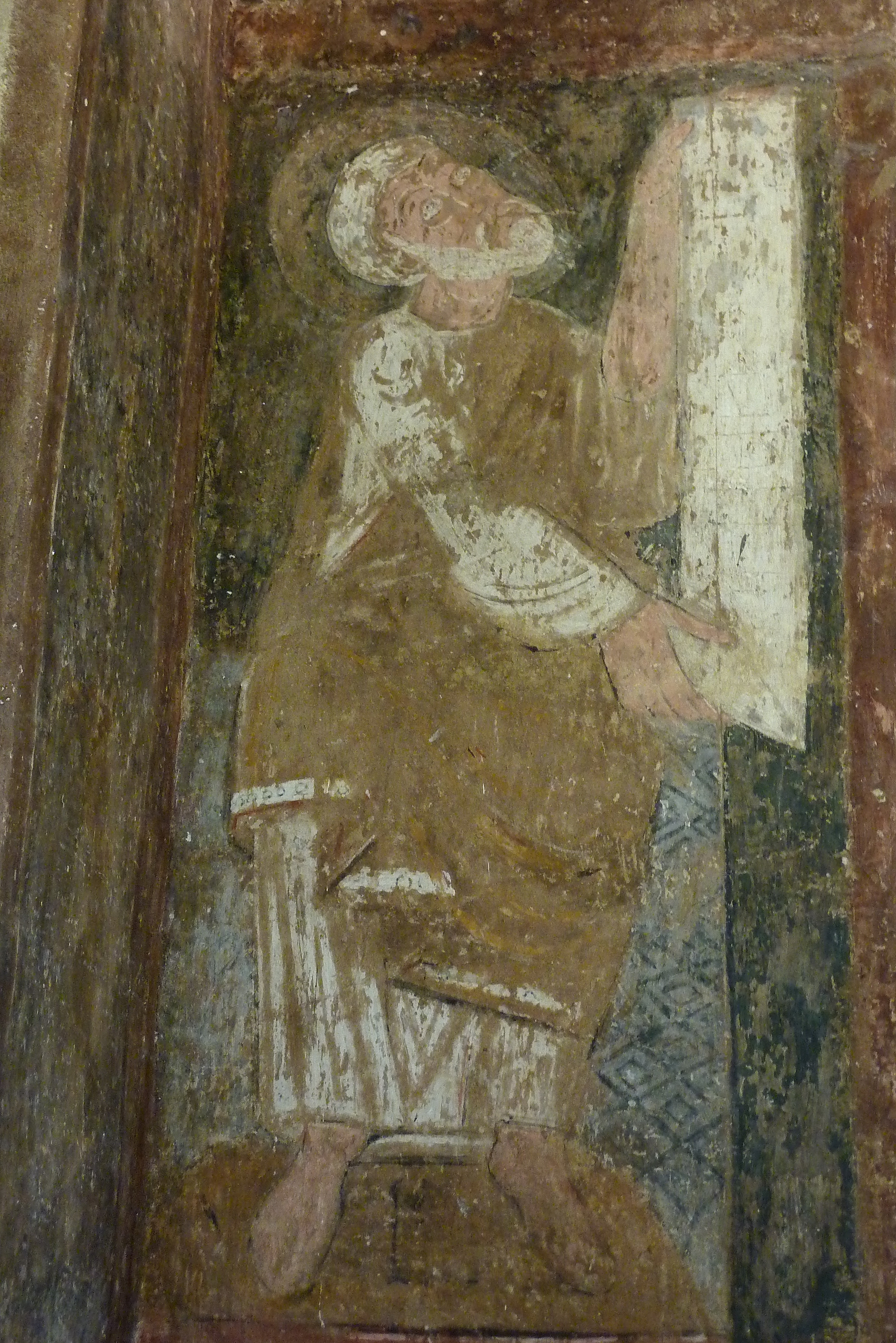 Ehemalige Abteikirche Saint-Theudère in Saint-Chef, einer Gemeinde im Département Isère in der französischen Region Rhône-Alpes, romanisches Fresko an der Südwand der Chapelle des Anges, Darstellung: Prophet Jesaja (?)